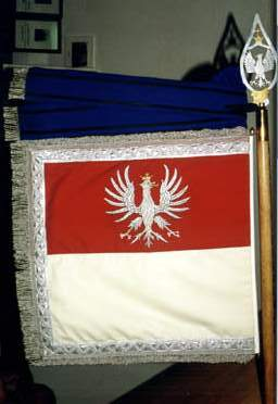 Sztandar 1 Pułku Ułanów Krechowieckich, kopia z Muzeum w Augustowie